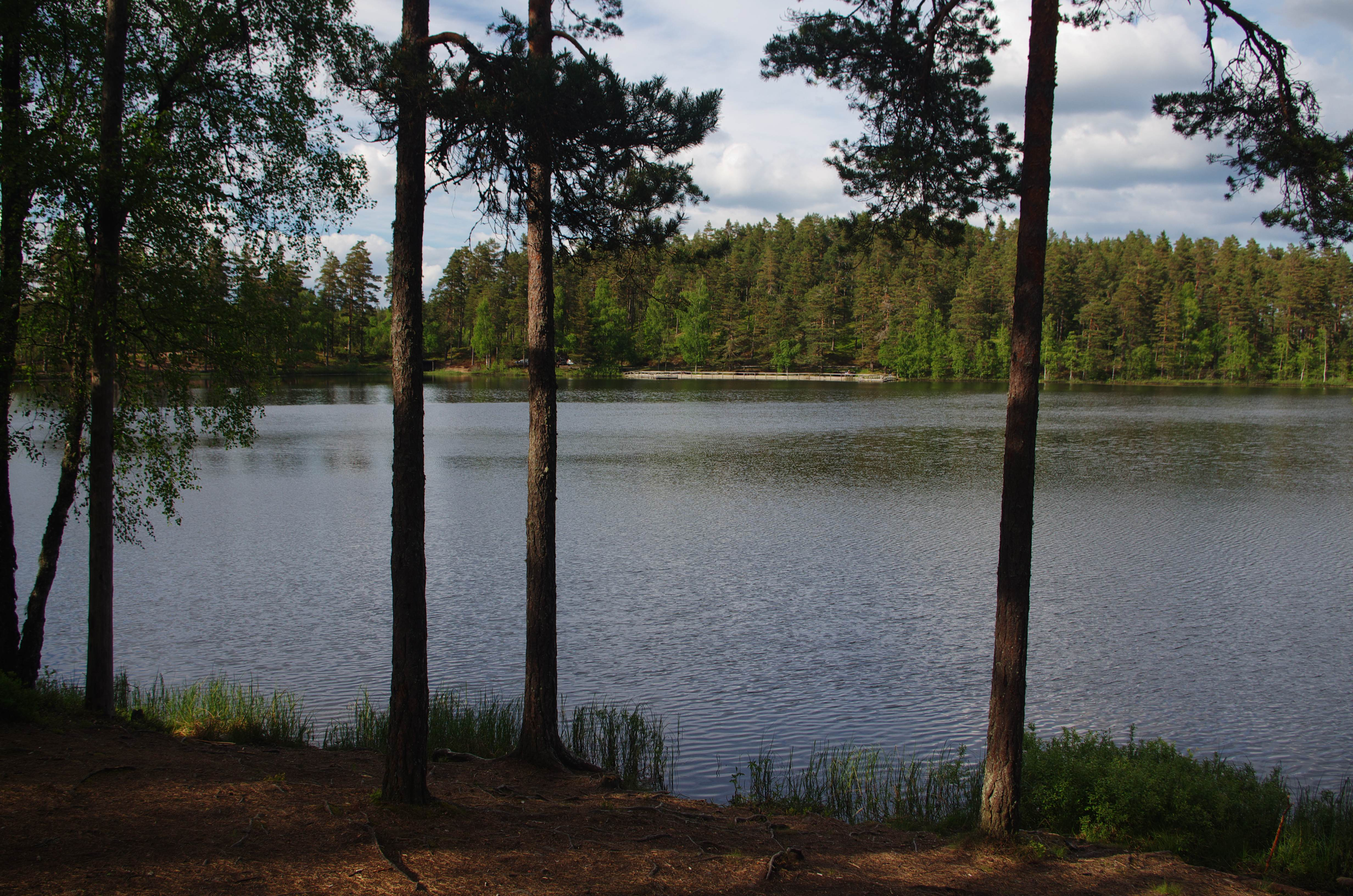 Björnsjön är en fiskesjö på Hökensås i Tidaholms kommun i Västergötland, Sverige.